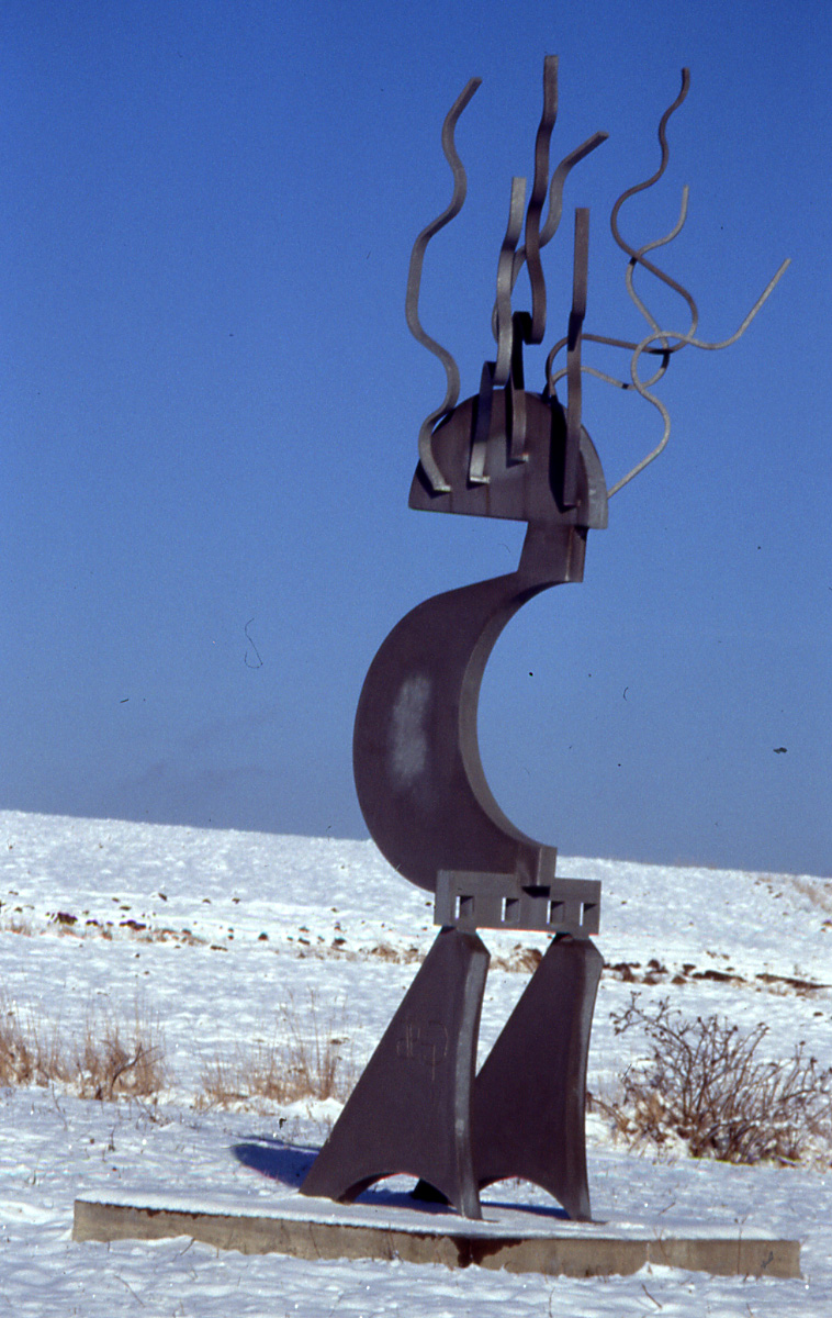 Sculpture "Cerebralo" by Prof. Claus-Frenz Claussen, Bad Kissingen